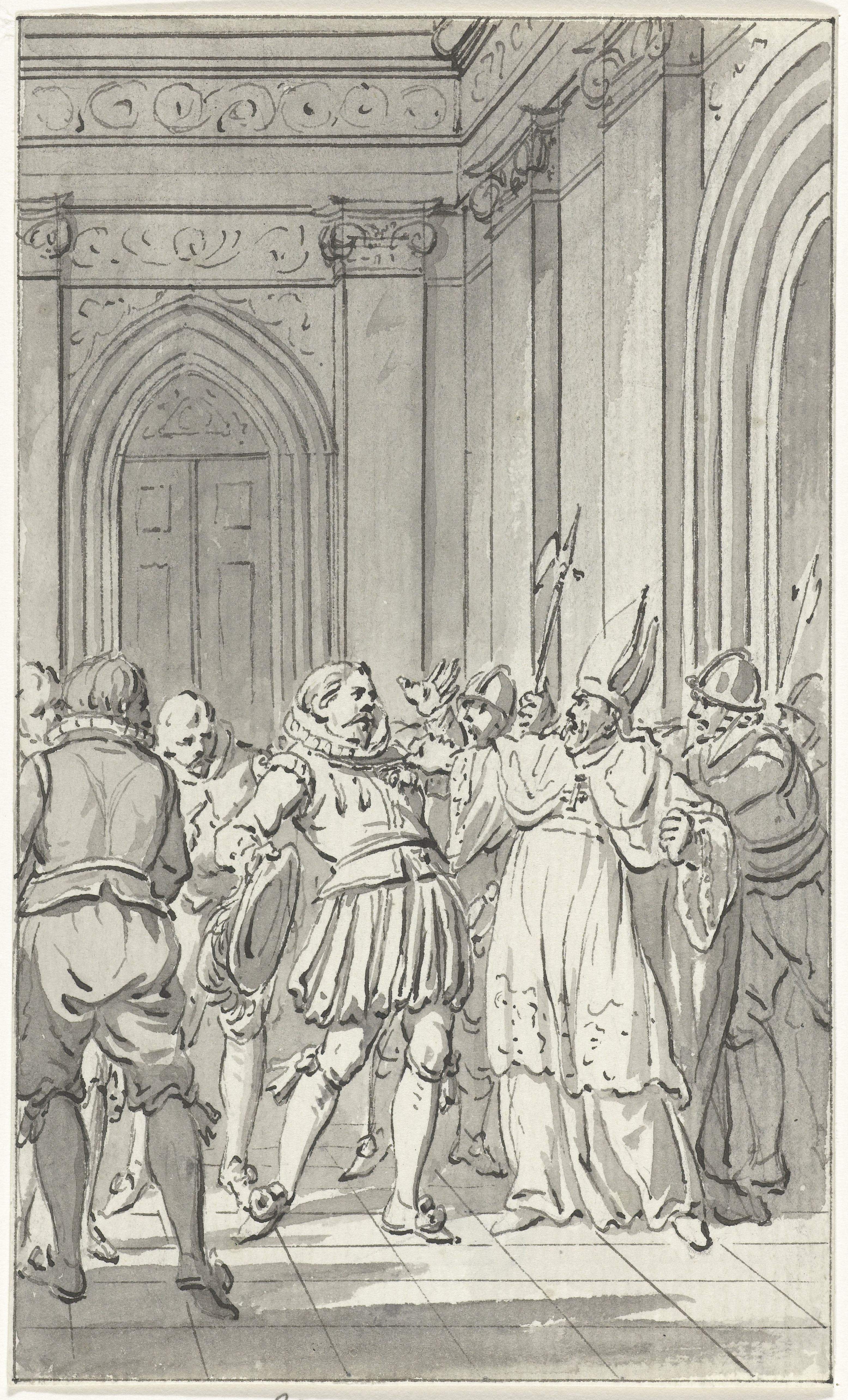 IdentificatieTitel(s): David van Bourgondië, Bisschop van Utrecht, ontneemt Reinoud II van Brederode de versierselen van de orde van het Gulden Vlies, 1470Objecttype: tekening ontwerp historieprent Objectnummer: RP-T-00-1383Catalogusreferentie: FMH 307-cOmschrijving: Reinoud II van Brederode, wordt door de bisschop van Utrecht David van Bourgondië de ridderorde van het Gulden Vlies afgerukt, wegens de (valse) beschuldiging dat hij een aanslag op het leven van Karel de Stoute beraamd zou hebben, 1470. Ontwerp voor een prent.VervaardigingVervaardiger: tekenaar: Jacobus BuysDatering: 1785 - 1787Fysieke kenmerken: pen en penseel in grijsMateriaal: papier inkt Techniek: pen / penseelAfmetingen: h 150 mm × b 90 mmToelichtingOntwerptekening voor illustratie in: Jacobus Kok, Vaderlandsch Woordenboek, Johannes Allart, Amsterdam 1785-1799, 35 delen, dl. VIII, pl. II.OnderwerpWat: historical person (BREDERODE, Reinoud II van)knighthood order of the Golden Fleecehistorical events and situations (with DATE)historical person (BOURGONDIE, David van) - scene directly related with life or life-story (BOURGONDIE, David van)archbishop, bishop, etc. (Roman Catholic)Bourgondische tijd in NederlandWanneer: 1470 - 1470Wie: Karel de Stoute (hertog van Bourgondië)bisschop van Utrecht David van BourgondiëReinoud II van BrederodeVerwerving en rechtenVerwerving: aankoop 1881Copyright: Publiek domein